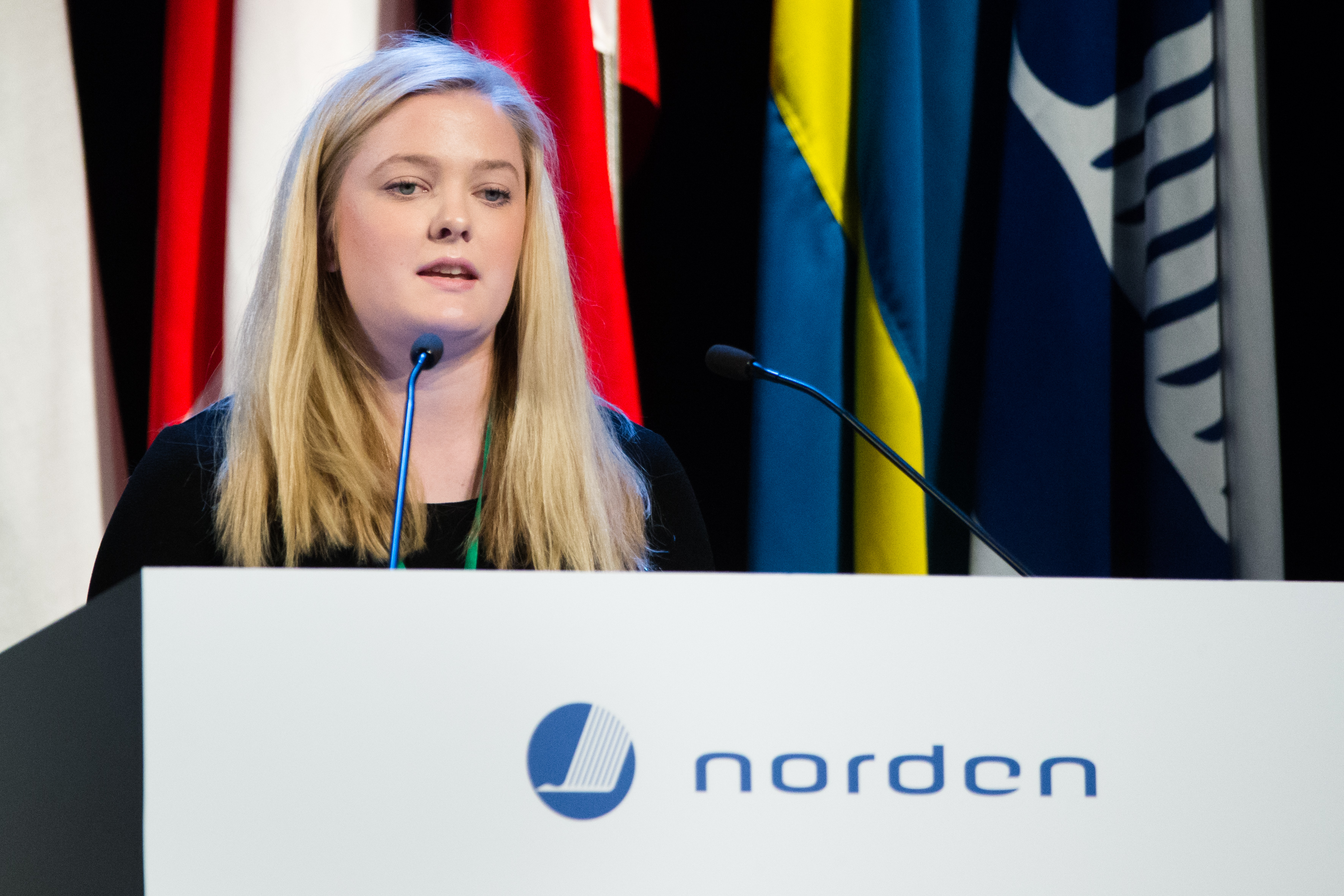 Anna Abrahamsson vid Nordiska Rådets session 2015 i Reykjavik på Island. Foto: Magnus Fröderberg/norden.org